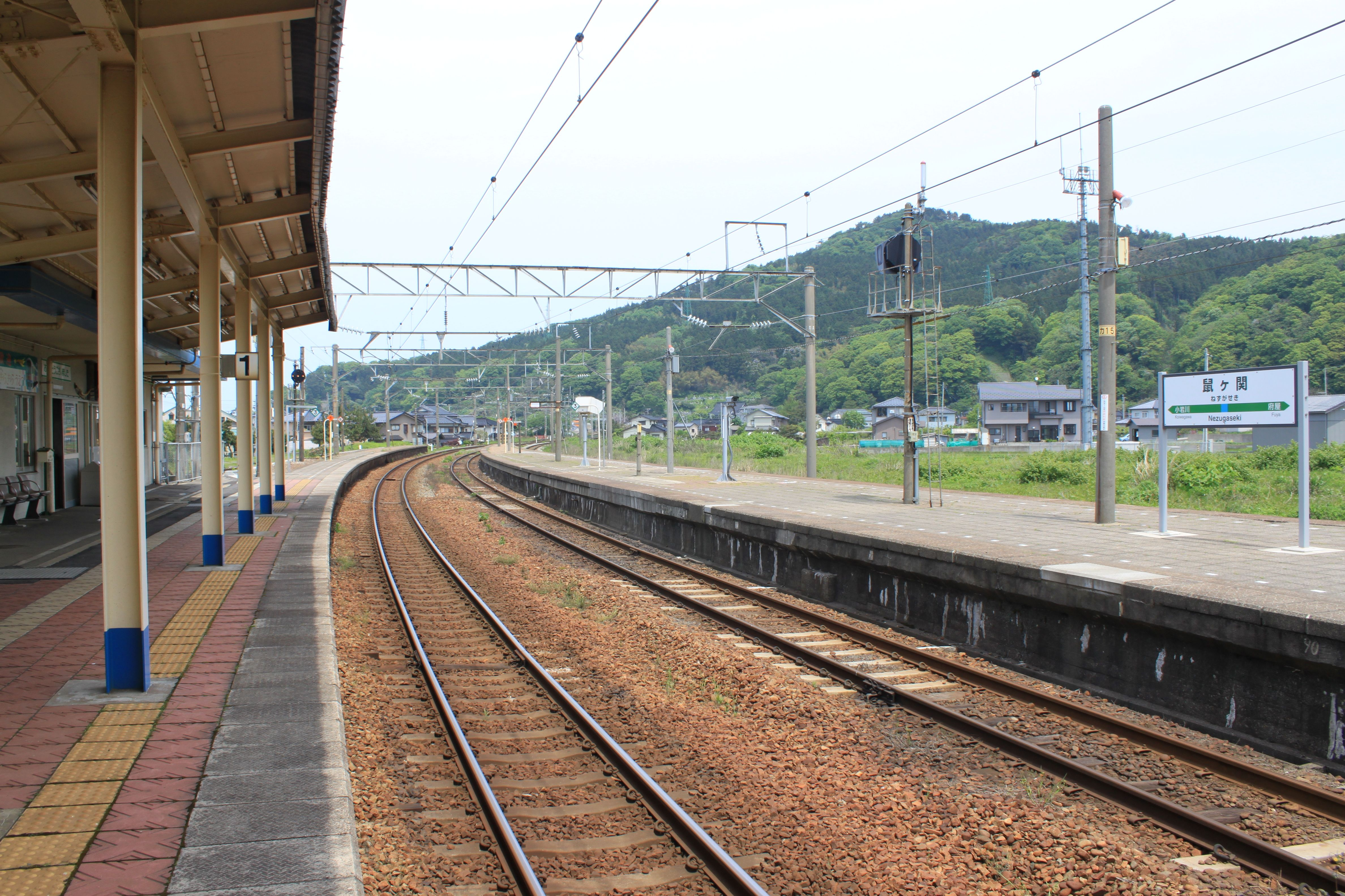 鼠ヶ関駅